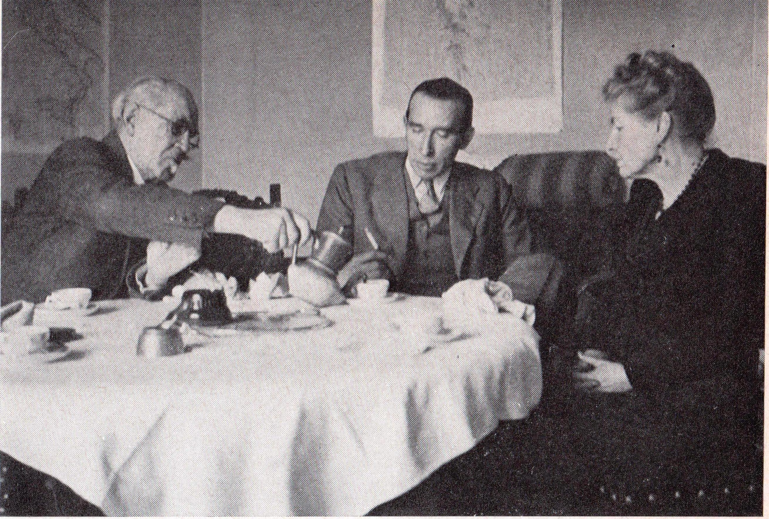 Troyes, février 1944. De gauche à droite : Paul Langevin, physicien français assigné à résidence par les Allemands, Pierre Bourgeois, neveu de Langevin, et Jeanne Langevin, épouse du scientifique